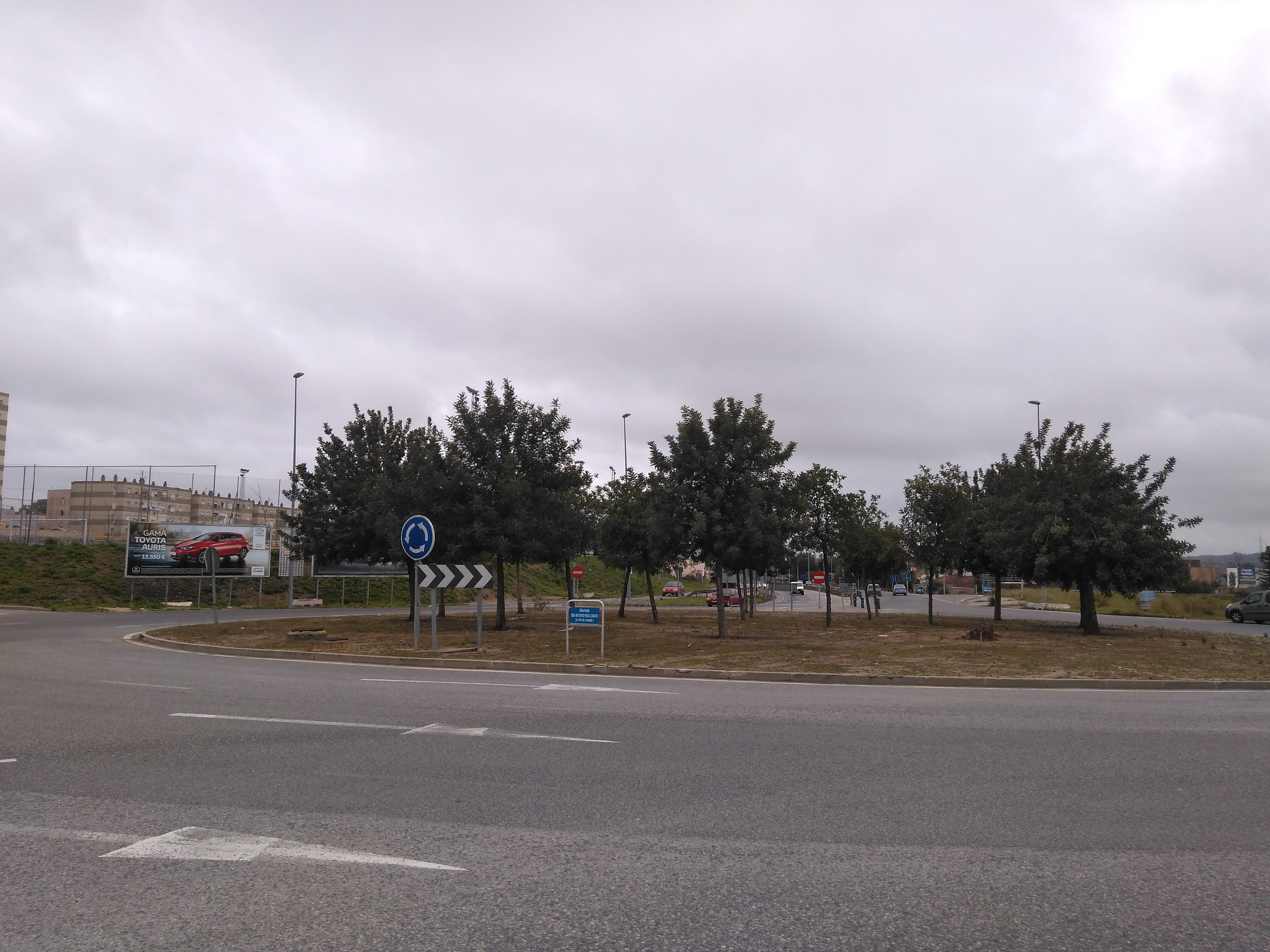 Glorieta Antonio Páez Lobato, el rey del vinagre. Jerez de la Frontera